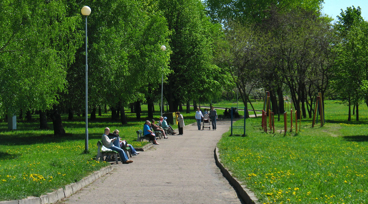 Парк імя 900-годдзя Мінска